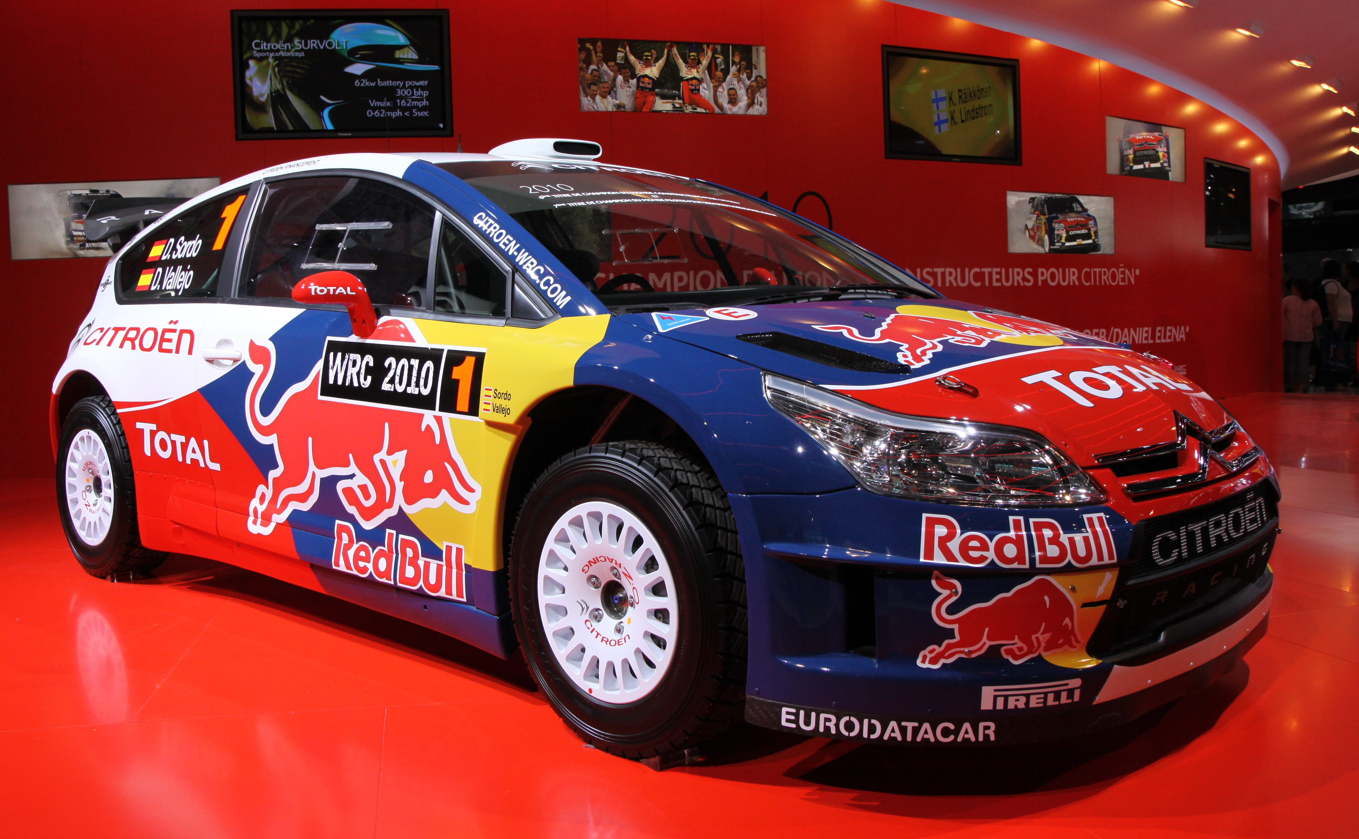 Une Citroën C4 WRC 2010 exposée au Mondial de l'automobile de Paris 2010.